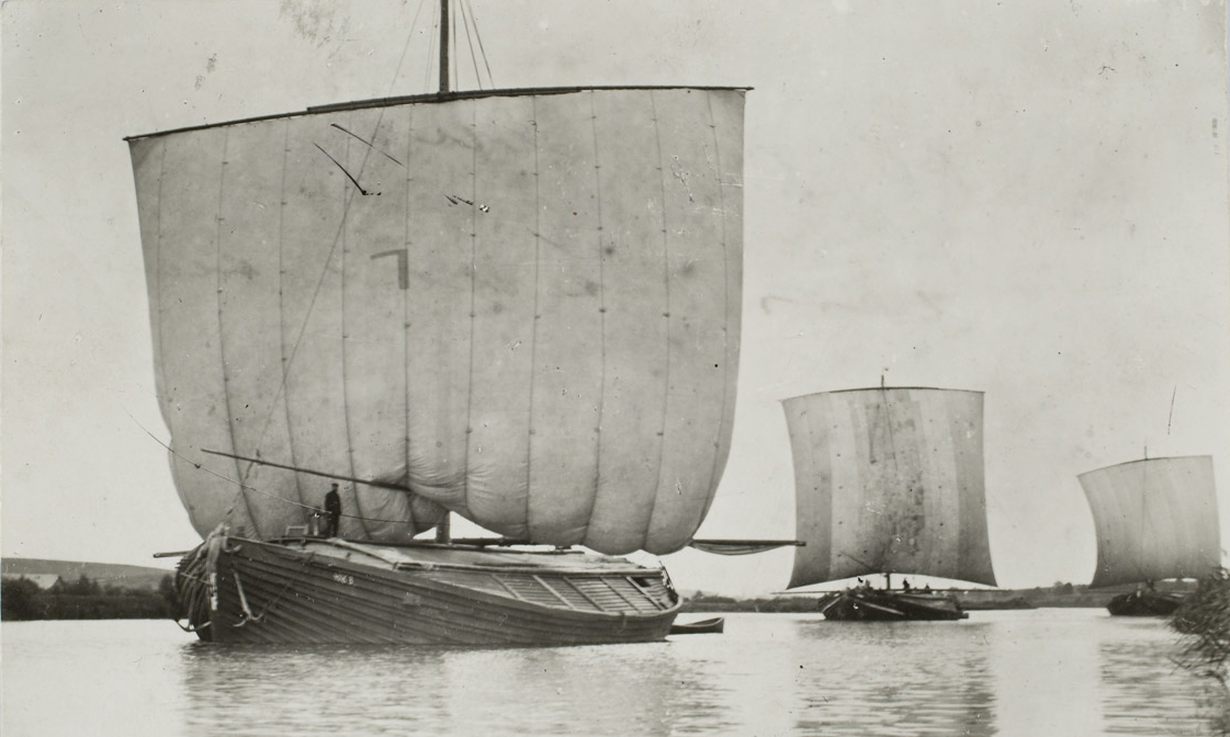 Lodjad Emajõel, Peipsi lotjade tüüp.